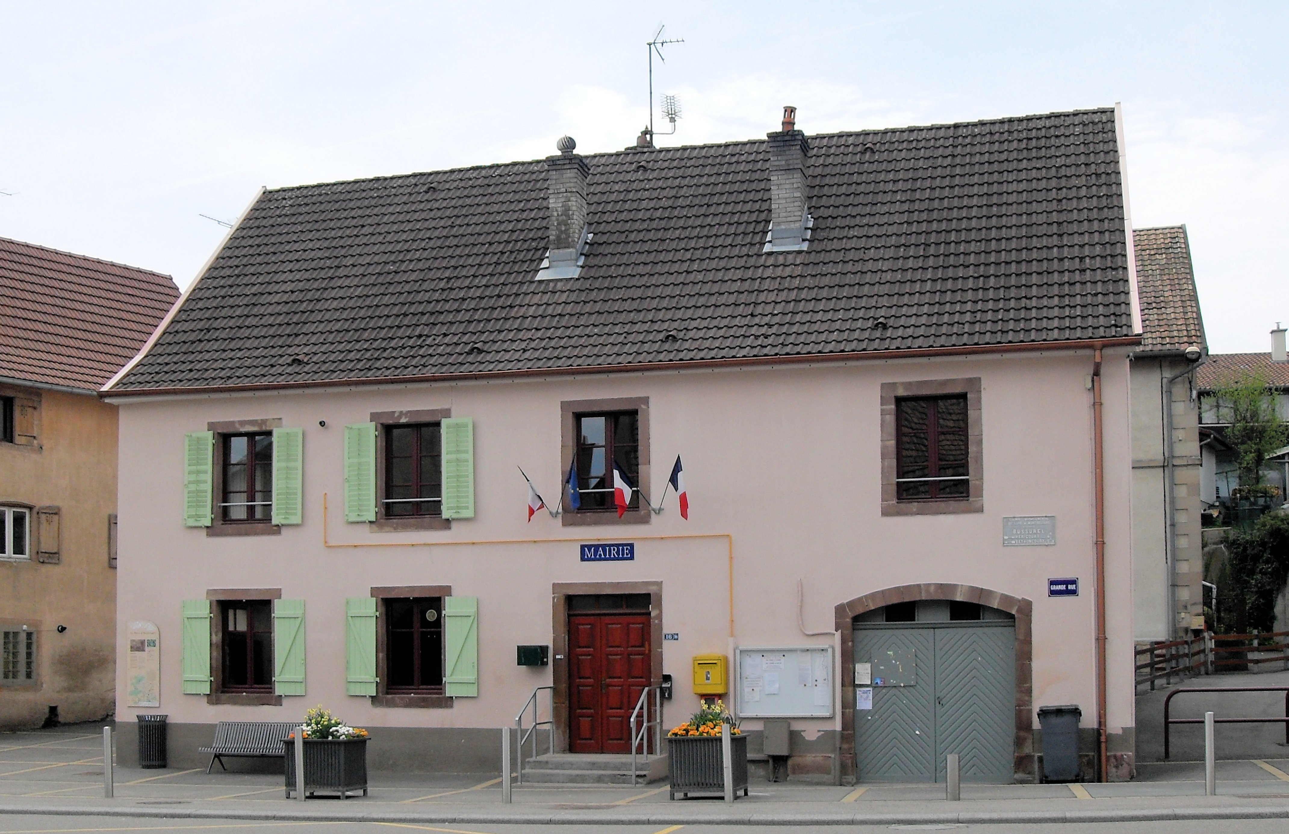 L'ancienne mairie de Bussurel, commune d'Héricourt